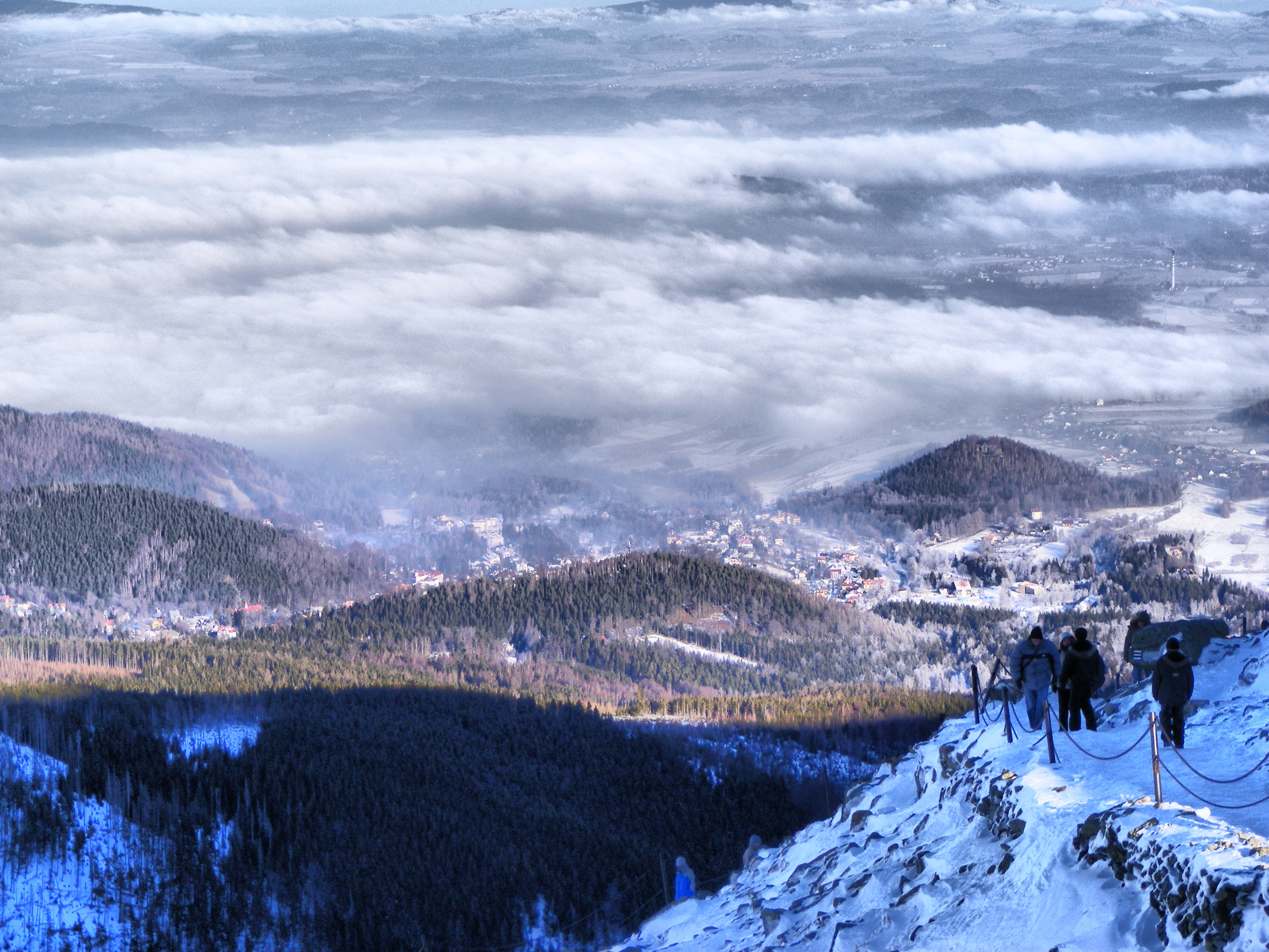 Widok ze szlaku na Śnieżkę na południe